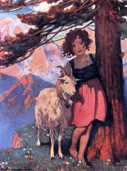 grafika